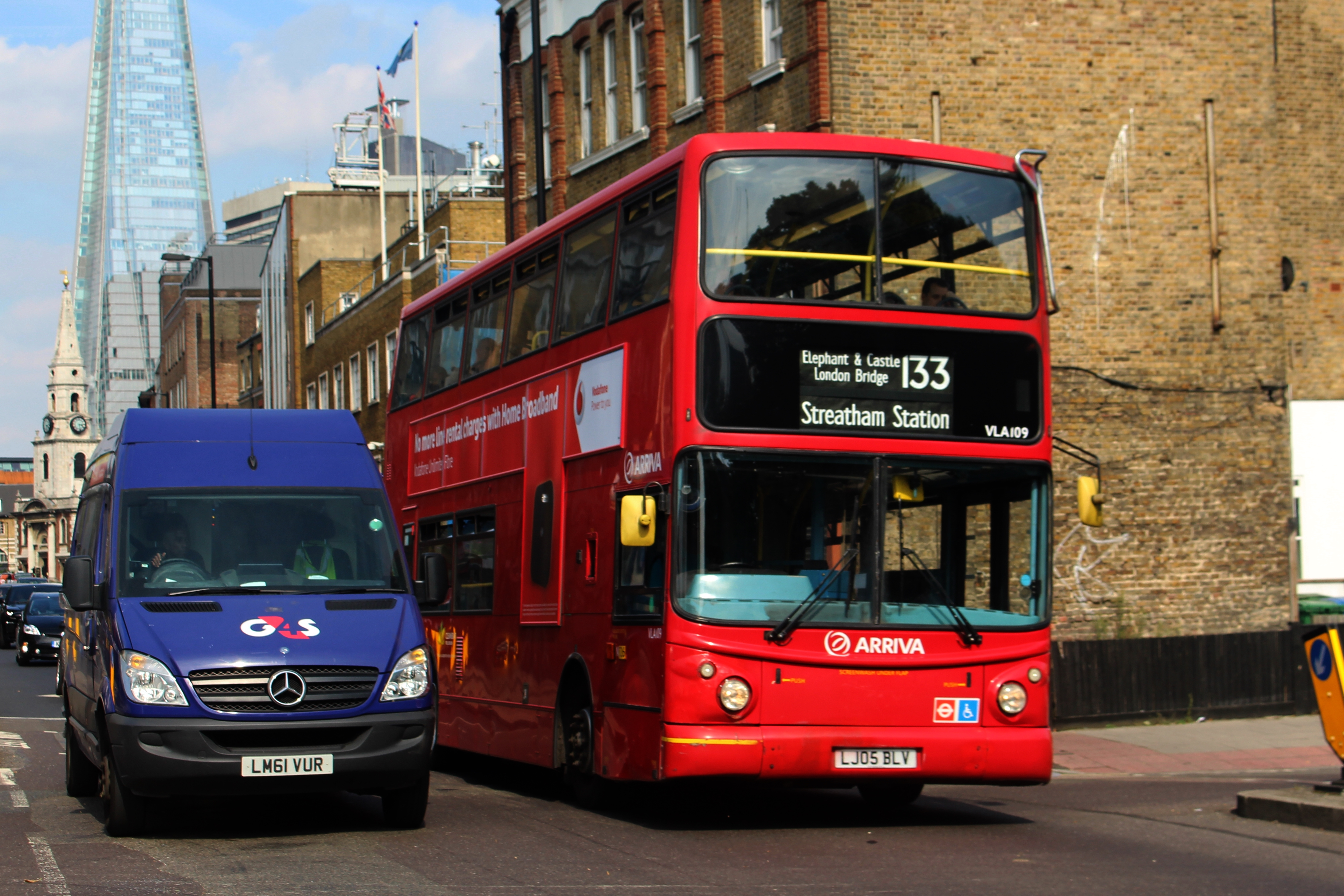 Arriva London - Volvo B7TL/Alexander Dennis ALX400 - VLA109 LJ05BLV - Route 133